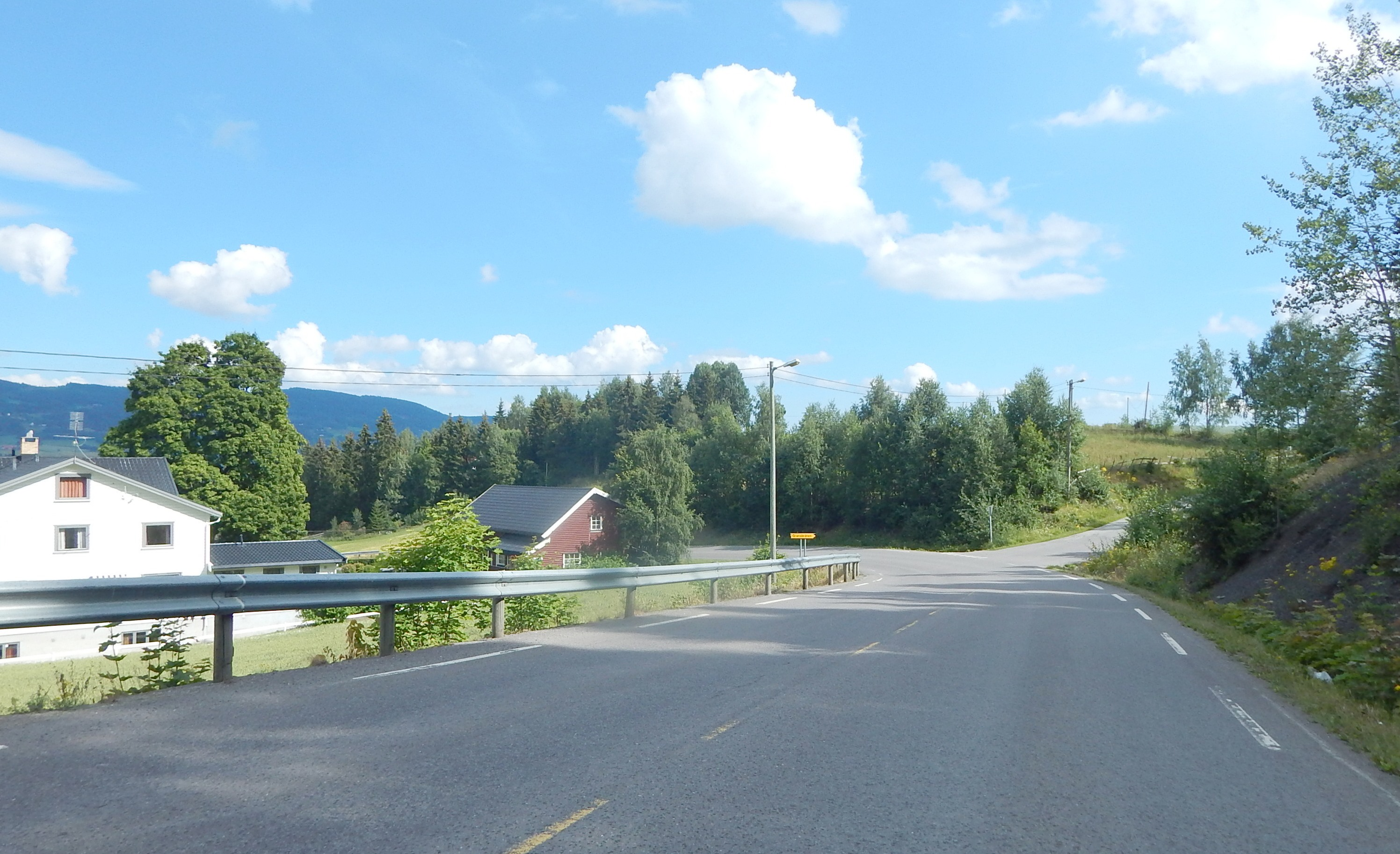 Ringdalslinna nedenfor Granavollen